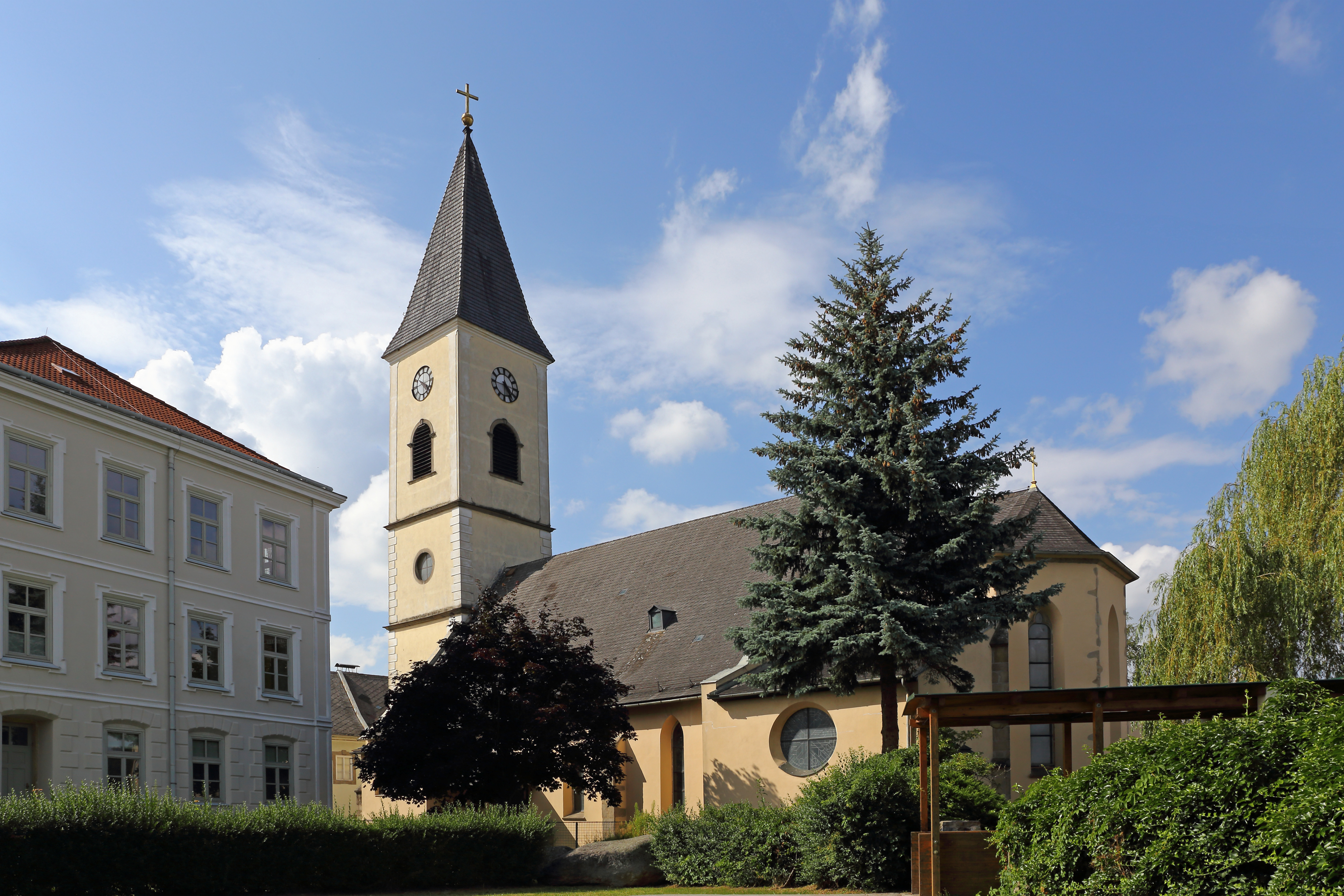 Die ursprünglich romanische Kirche wurde im 13. und 15. Jahrhundert ausgebaut. Der heutige Kirchturm wurde von 1852 bis 1854 errichtet. Der Chor wurde 1981/1982 nach Plänen des Architekten Clemens Holzmeister erweitert. Die Kirche besitzt eine neugotische Einrichtung.